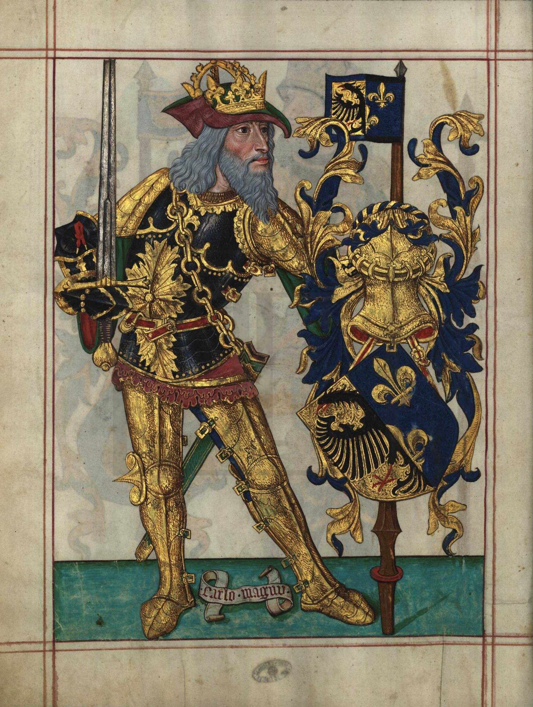 Livro do Armeiro-Mor, Carlos Magno (fl 4v)